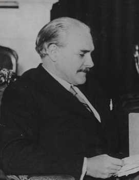 Miklos Kallay, premier Węgier. Fotografia sytuacyjna - przegląda dokumenty.